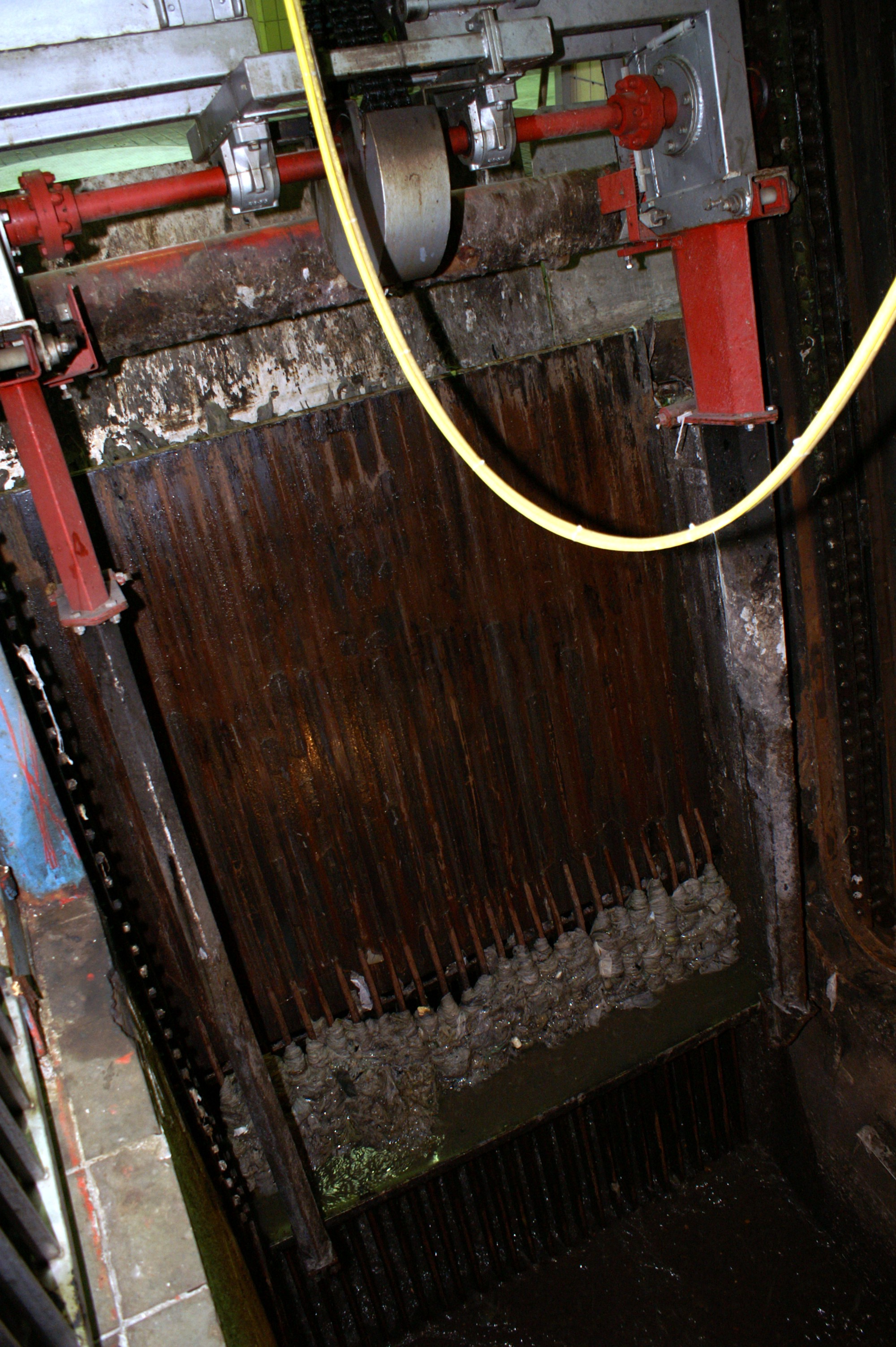 Hamburger Stadtentwässerung Rechenwerk zur Entfernung groben Schmutzes aus den Abwässern